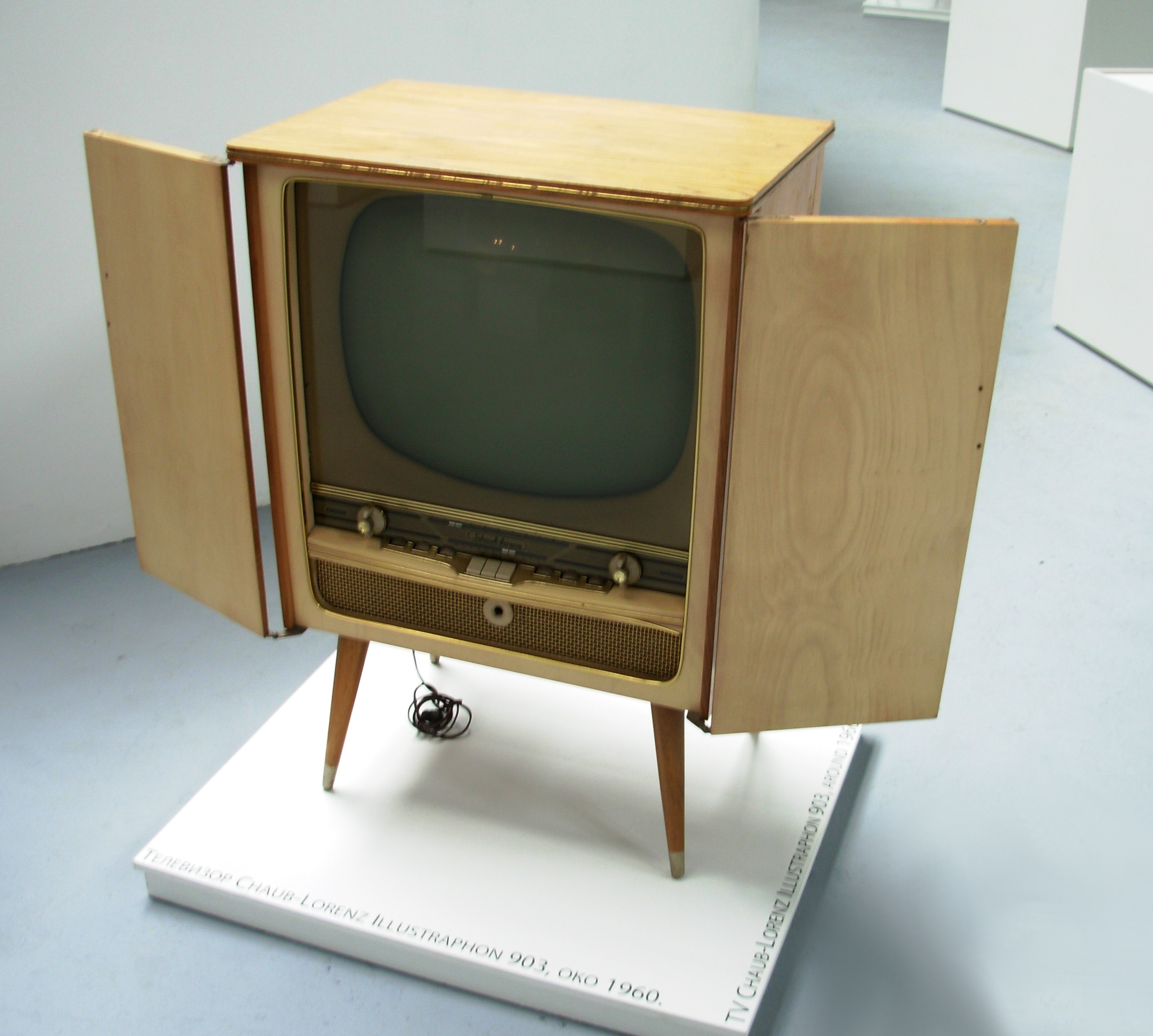 Телевизијски пријемник из 1960. Снимио Голдфингер у Музеју Технике у Београду.